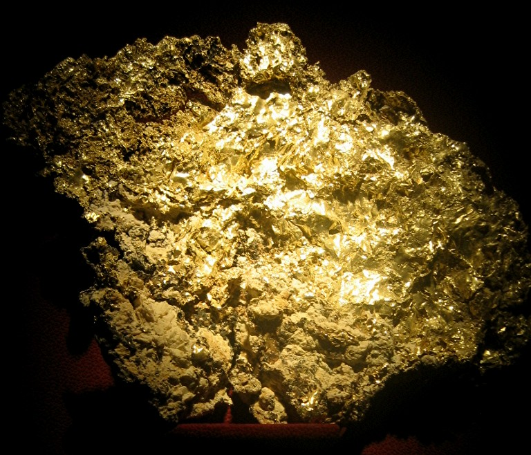 Or natif en cristaux lammellaires. 29X22X2 cm. 2 kg. Mine de Jamestown, Comté de Tuolumne, Californie, USA. Conservé à la Galerie de Minéralogie et de Géologie, Paris